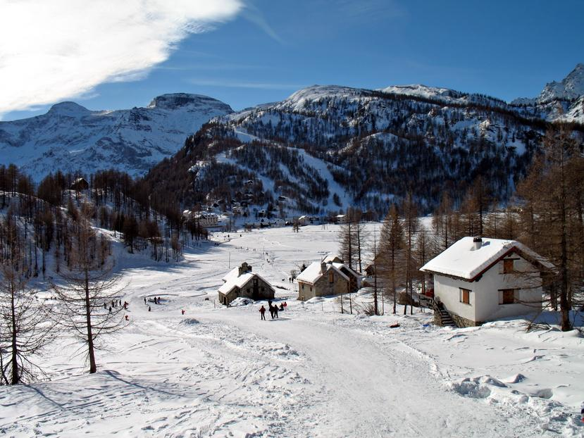 Alpe Devero, Italia. Parco naturale Devero Veglia